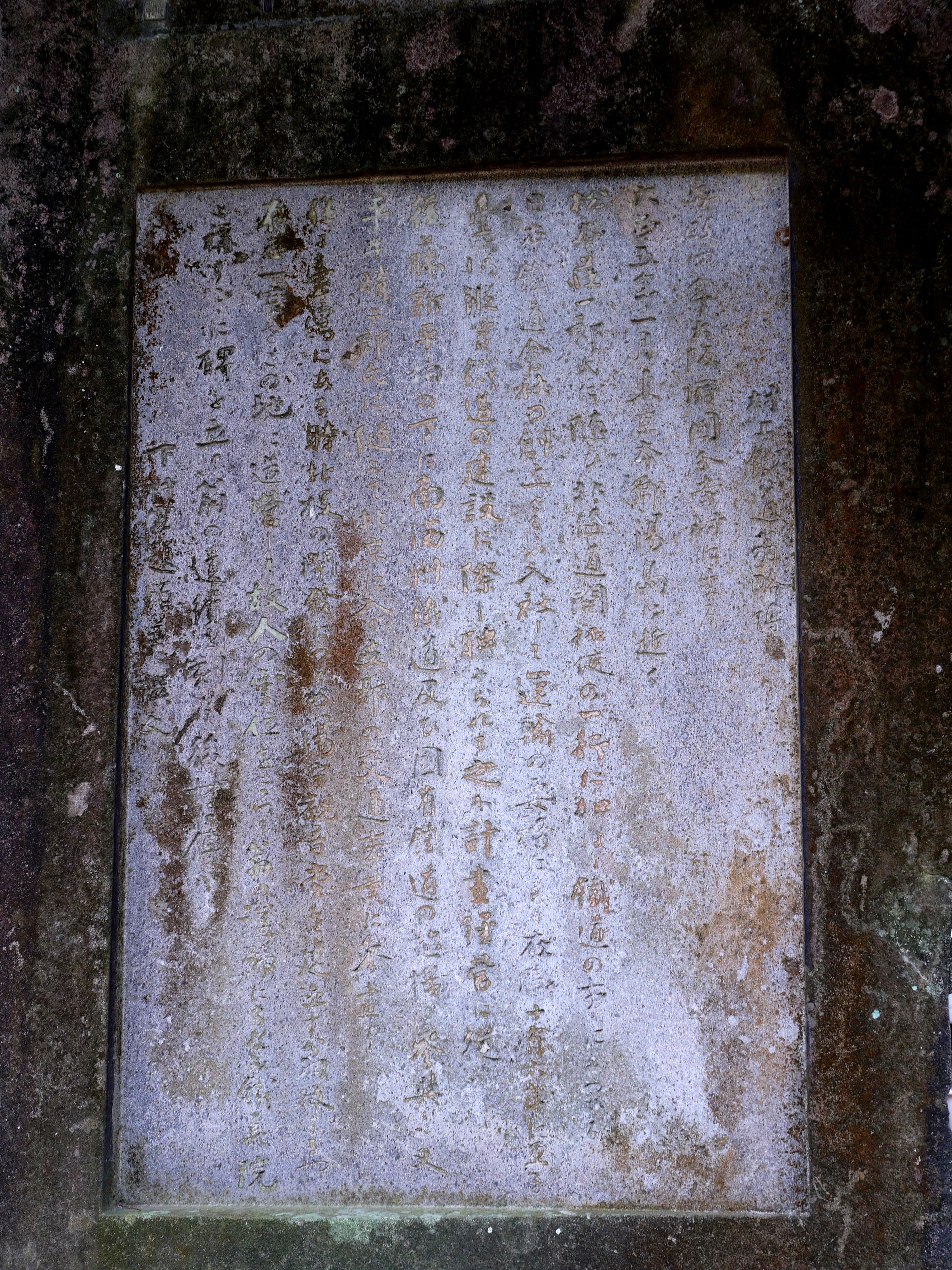 村上鐵道翁略傳碑(昭和九年七月) 碑文 安政四年大阪府國分寺村に生る 大正五年一月東京本鄉湯島に逝く 松本莊一郎氏に隨ひ北海道開拓使の一行に加はり鐵道の事にめつかる 日本鐵道會社の創立さるるや入社して運輸の要務に当り在職十有六年に亙る 臺灣縱貫鐵道の建設に際し聘せられて之か計畫經營に從ふ 後滕新平伯の下に南滿州鐵道及ひ國有鐵道の樞機に參與し又 平井晴二郎氏に隨ふて北京に入り支那の交通事業に參畫す 任を臺灣にめる時北投の開發につとめ湯守觀音堂を建立す翁歿するや 有志一宇をこの地に造營して故人の靈位をまつり翁の謚號にちなみ鐵真院 と稱すここに碑を立て翁の遺績を刻して後世に傳ふ 下村宏題額並に譔文